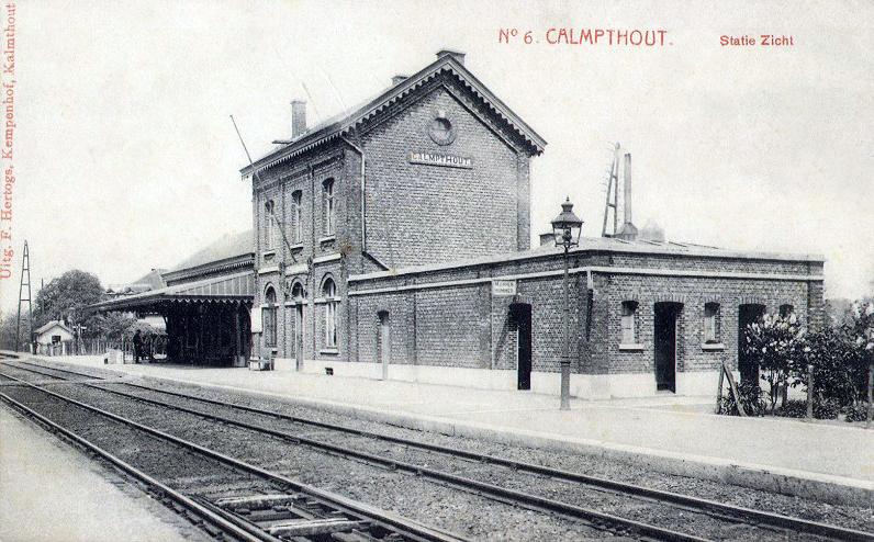 La gare de Kalmthout, vers 1910, avec ses deux ailes.